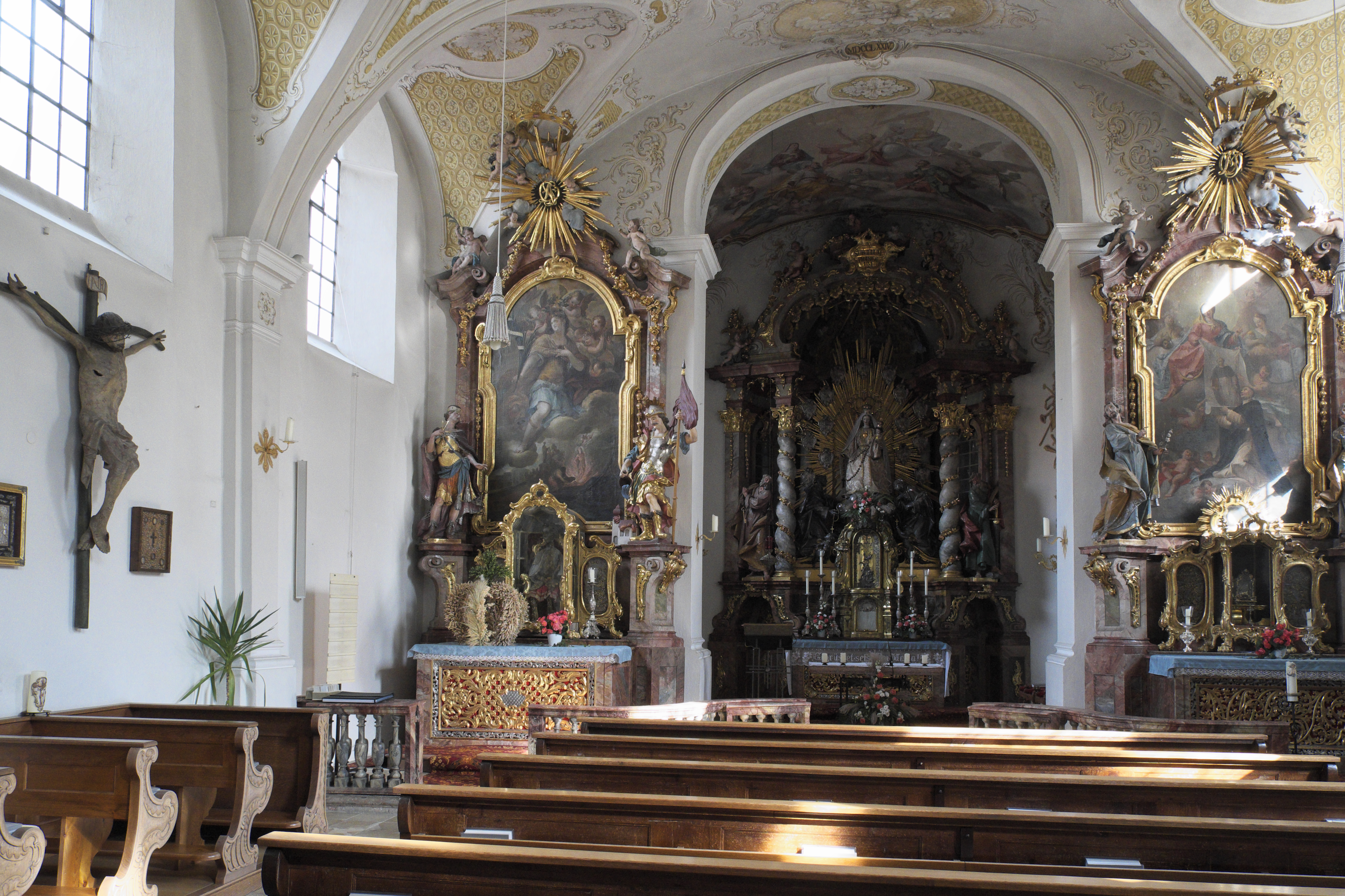 Ehemalige Dominikanerinnenklosterkirche St. Peter und Paul, heute Filialkirche, in Altenhohenau (Griesstätt) im Landkreis Rosenheim (Bayern/Deutschland), Deckenmalerei